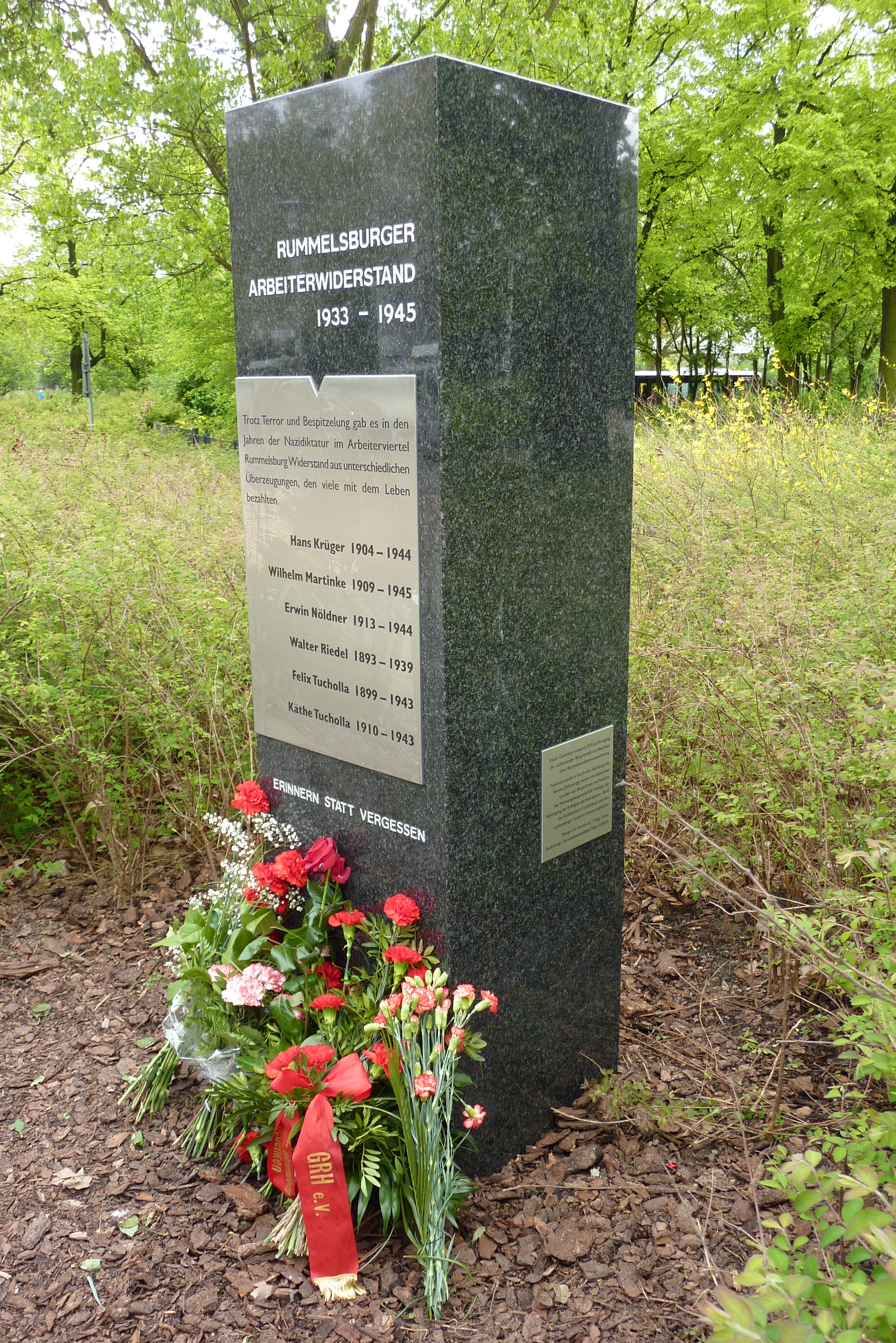 Gedenkstein auf dem Nöldnerplatz in Berlin-Rummelsburg. Granitstele mit gravierter Stahltafel. Eingeweiht am 7. Mai 2010. Blickrichtung Süden.